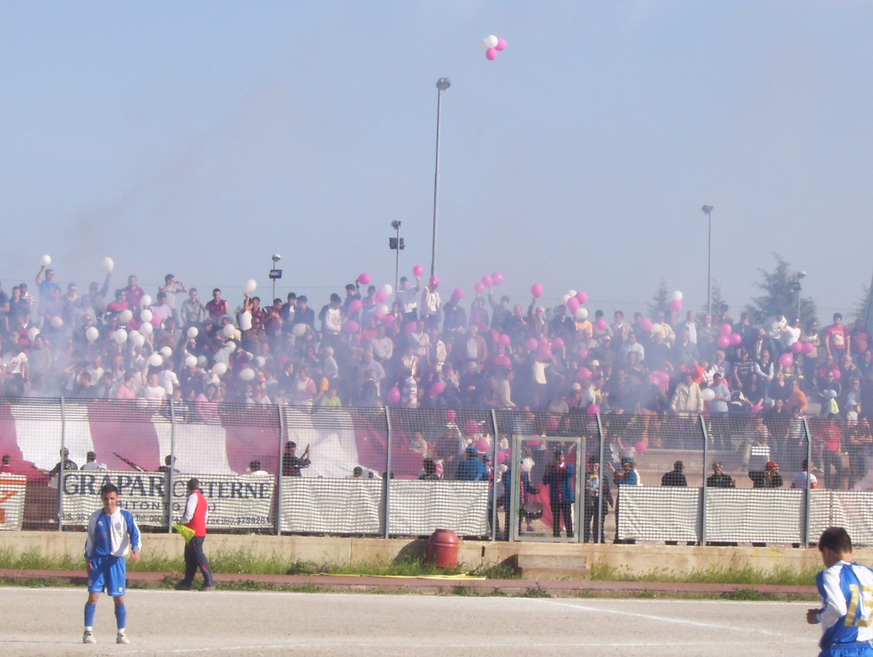 Sport calcio Bitettese. /category: Soccer